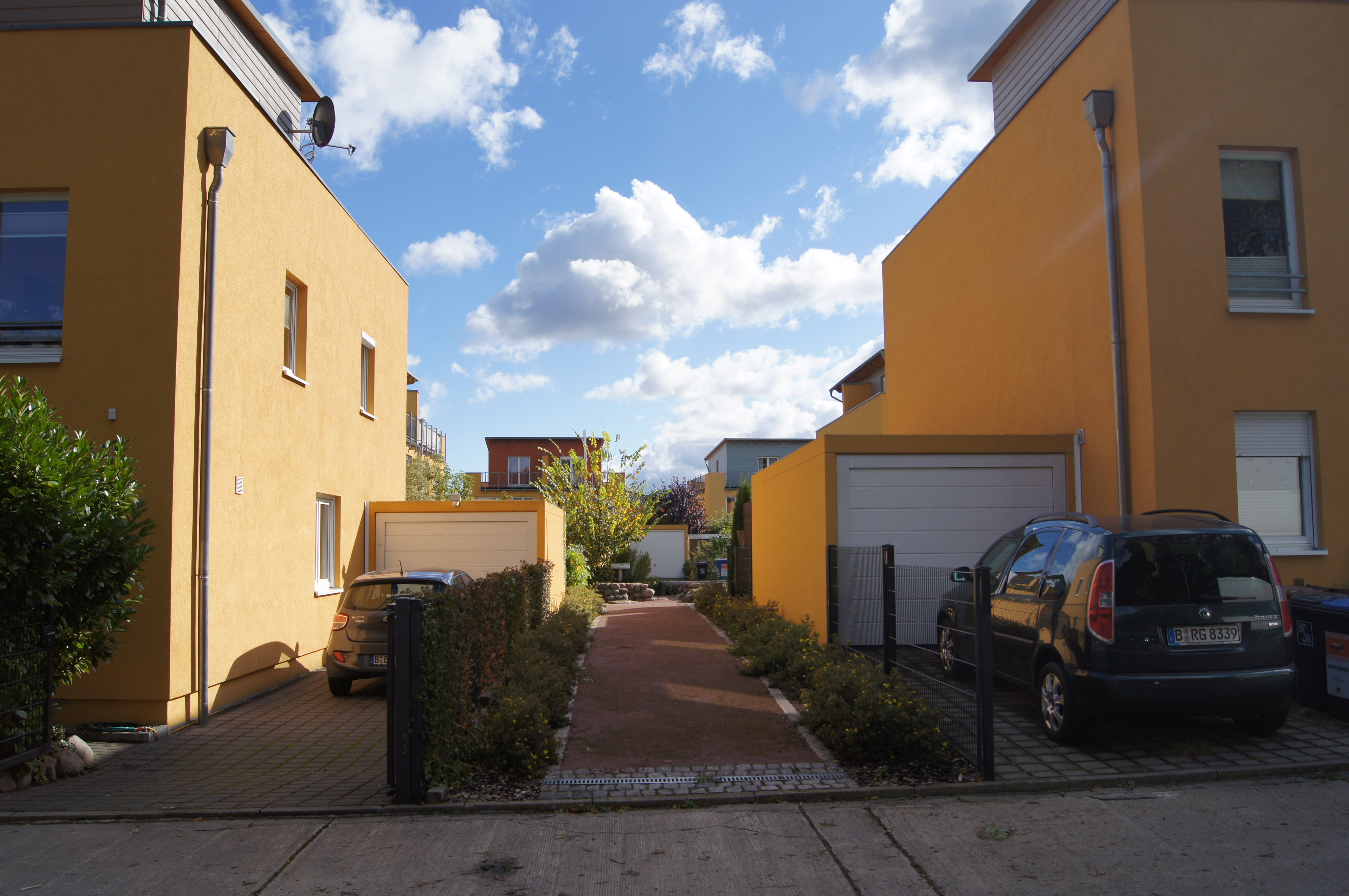 Rosenthaler Wohnturm